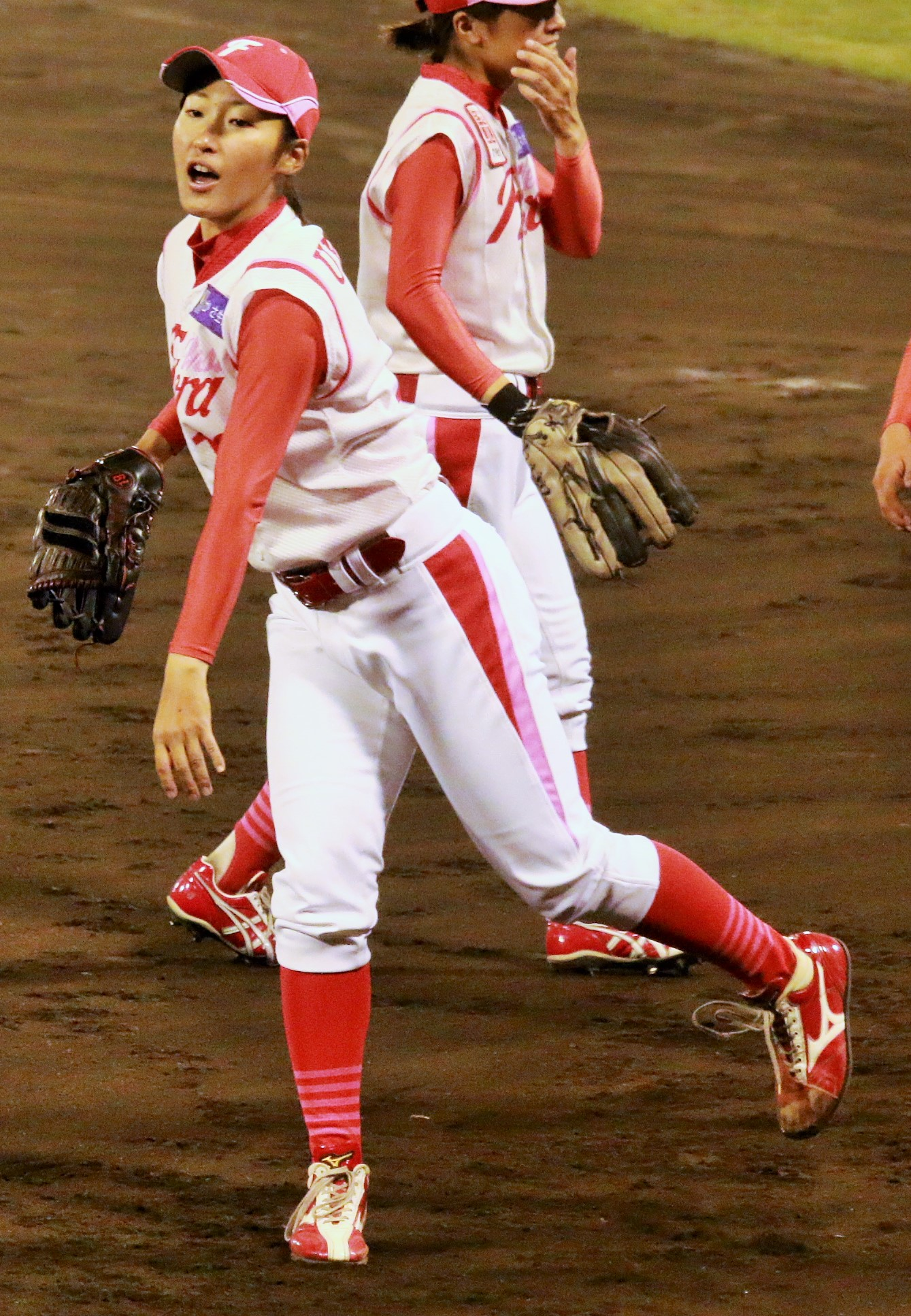 ウエストフローラ植村美奈子